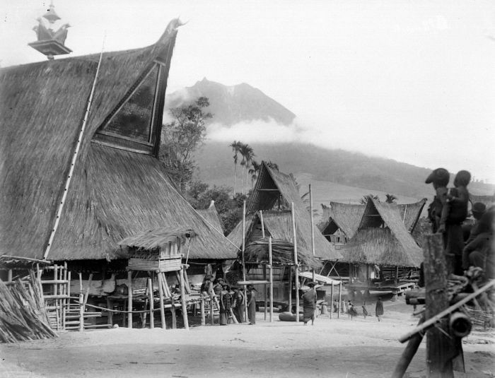 Negatif. Sigaranggarang, bangunan tradisional Karo dengan latar belakang Gunung Sinabung. Perhatikan batang bambu di sisi kiri foto sebagai tangga menuju atap rumah.